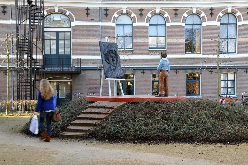 De Schildersplaats, in de volksmond Weddesteegplein, is in april 2006 omgedoopt in Rembrandtplaats. Het kunstwerk is geïnspireerd op het zelfportret van Rembrandt in zijn Leidse atelier uit 1629. De jonge Rembrandt kijkt naar de schildersezel met daarop een bronzen reliëf van een zelfportret. Aan de muur achter de schildersezel hangt nog een ander portret van Rembrandt, uitgevoerd in keramiek (niet op deze foto meegenomen). Kunstenaar Stephan Balkenhol (Duitsland 1957).